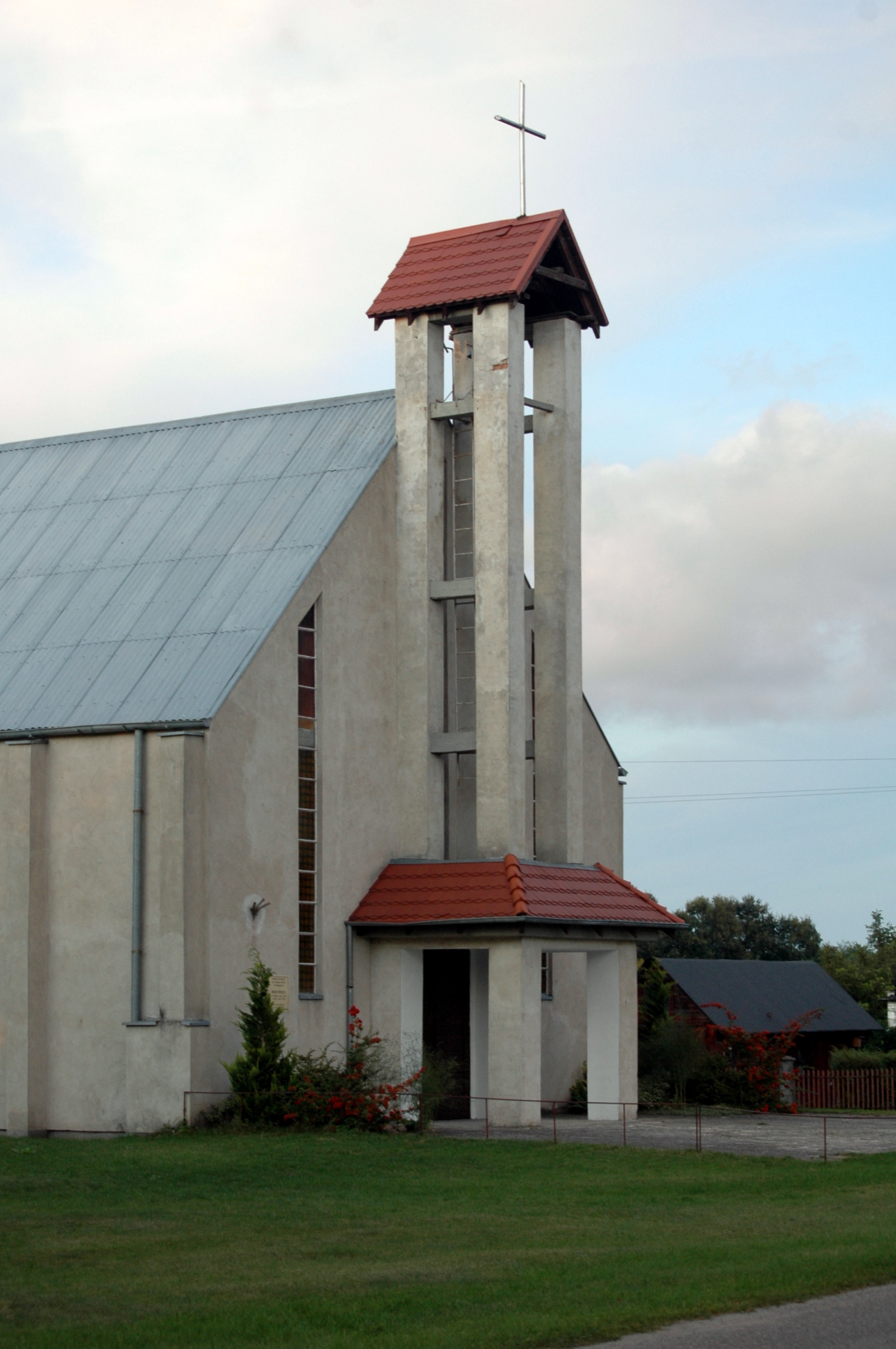 Ostromice - rzymskokatolicki kościół filialny p.w. Świętego Krzyża.